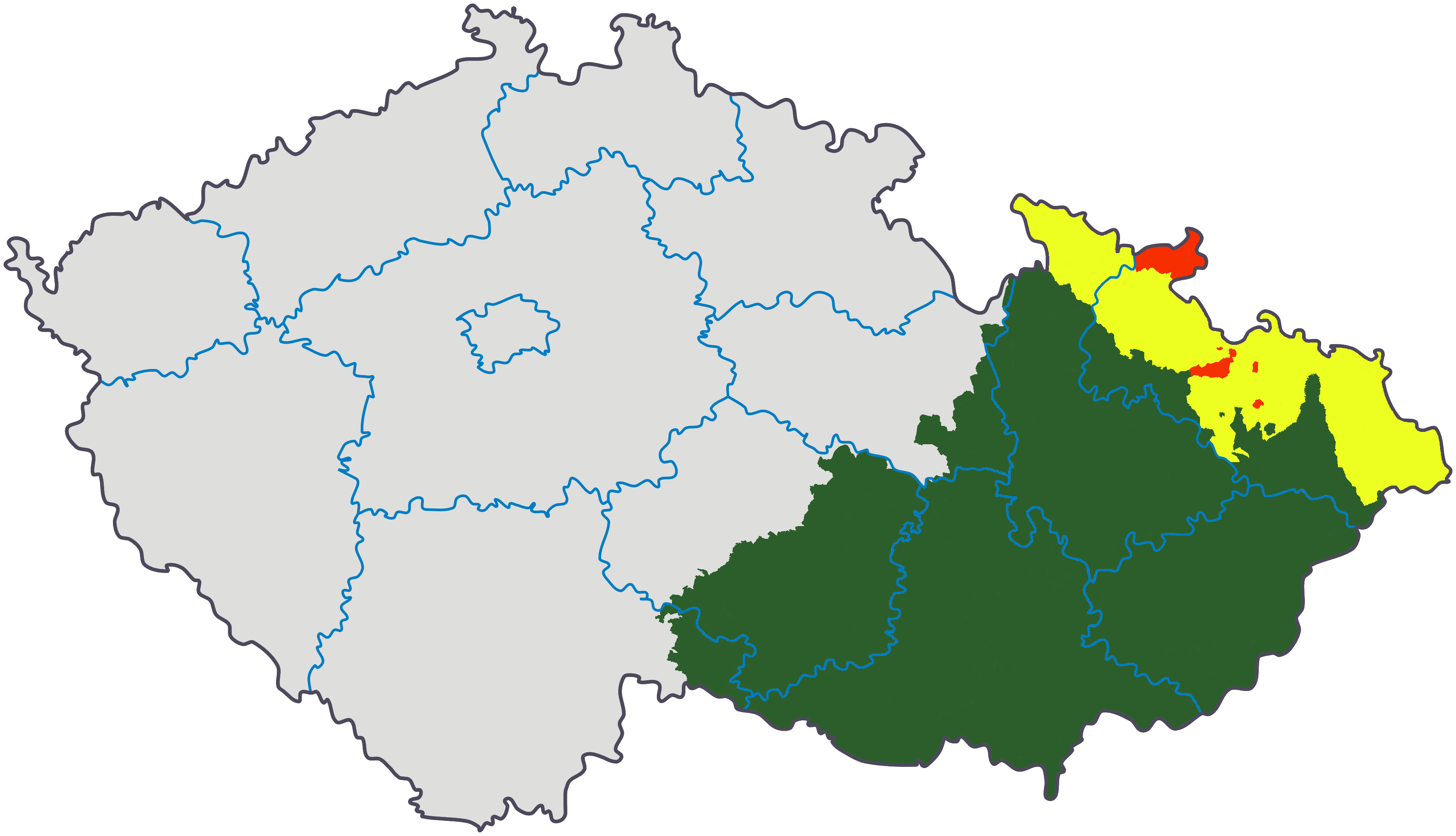 Česky: Země Moravskoslezská (zeleně, žlutě, červeně) na mapě dnešní České republiky. Zeleně je vyznačena její moravská část (v hranicích od roku 1924), žlutě její slezská část (v hranicích od roku 1920), červeně tzv. moravské enklávy ve Slezsku, spravované do roku 1928 slezskými zemskými orgány, ale například daňově podléhající Moravě.